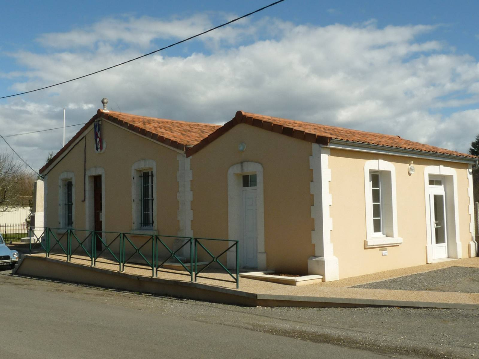 mairie de Lussac, Charente, France